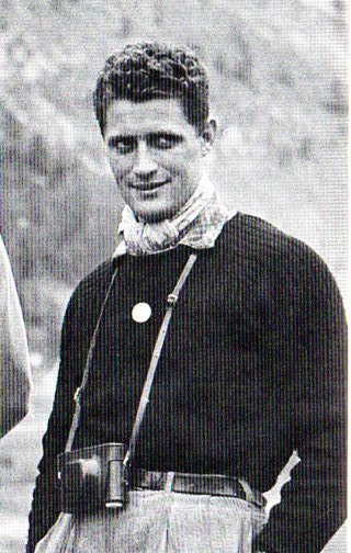 Josve Aiazzi